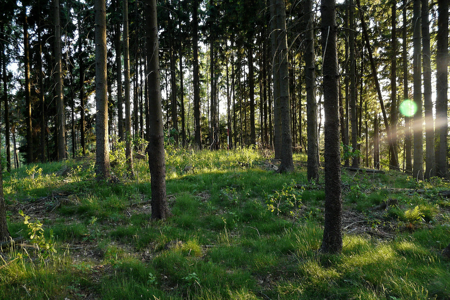 Vrchol Jelínky